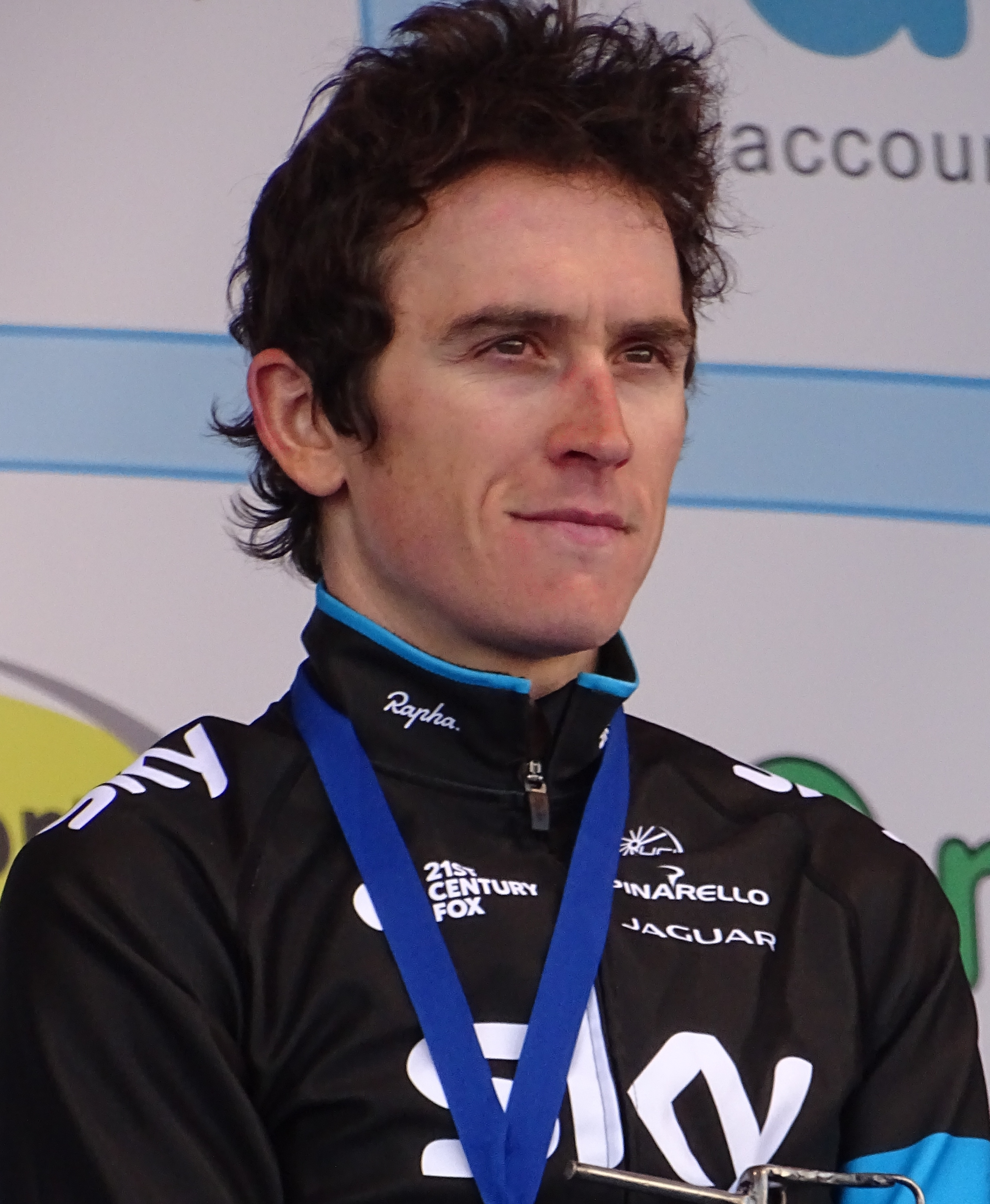 Reportage réalisé le vendredi 27 mars à l'occasion du départ et de l'arrivée du Grand Prix E3 2015 à Harelbeke, Belgique.